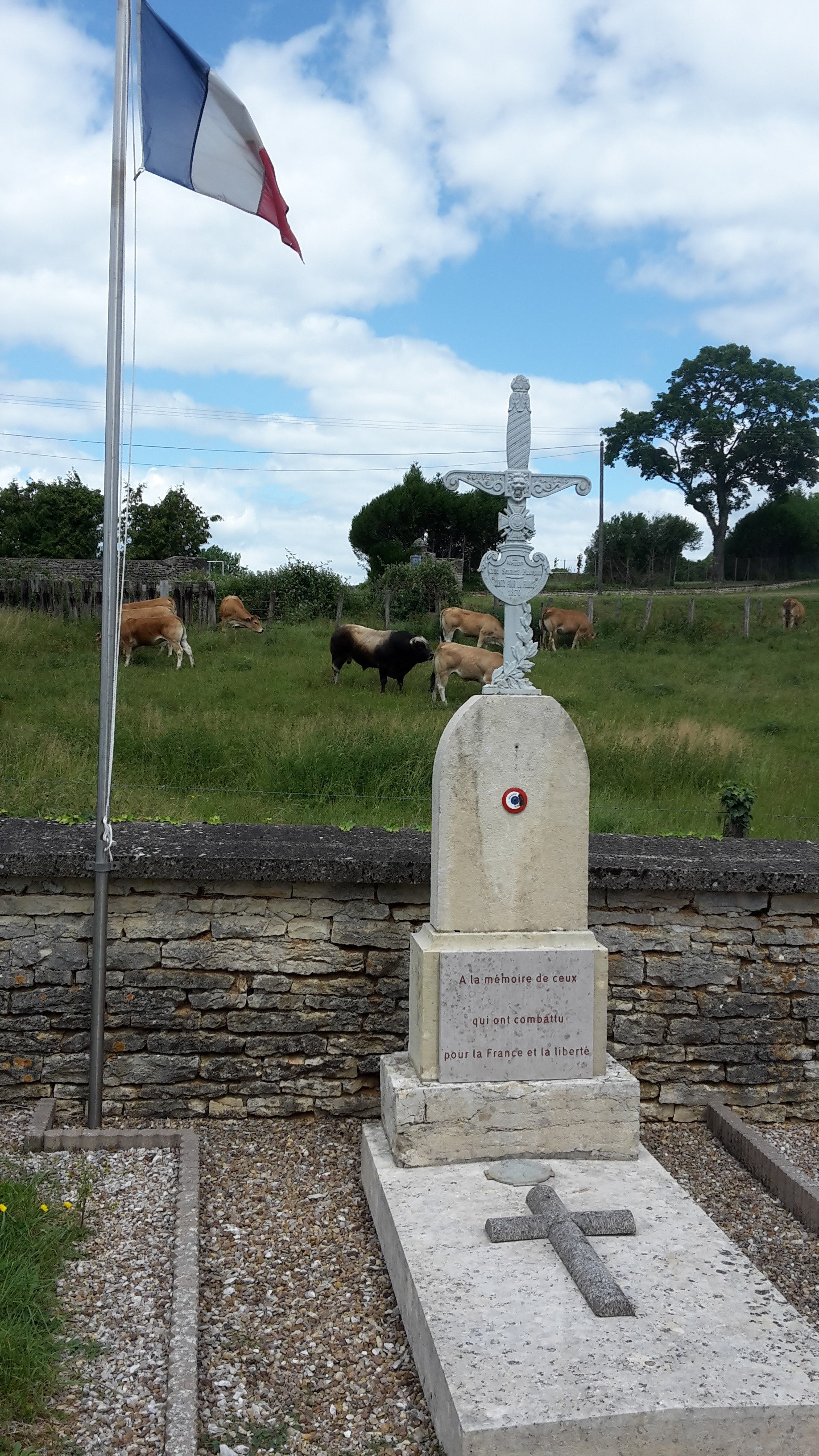 Tombe des cinq mobiles de la Loire tombés au combat du 27 octobre 1870 à Saint-Seine-sur-Vingeanne (Côte-d'Or).